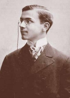 Tóth Árpád magyar költő, műfordító.